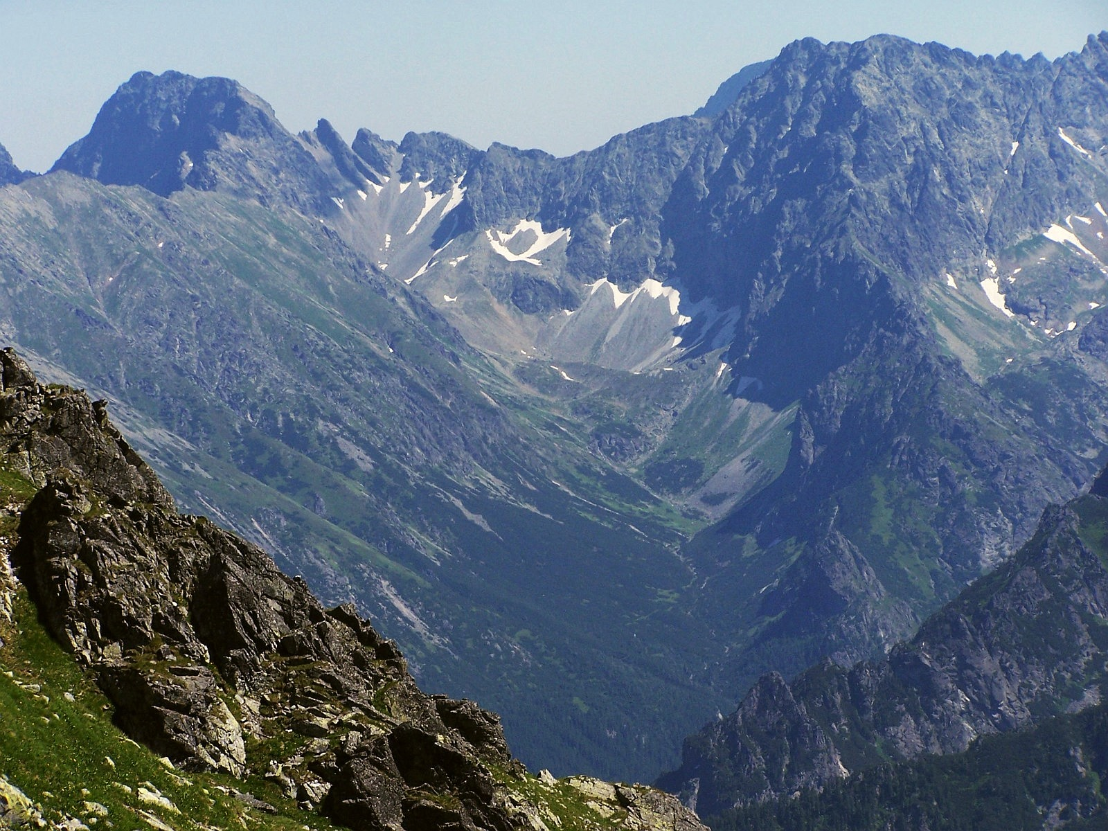 Dolina Rówienki. Widok z przełęczy Krzyżne. Na środku u góry Świstowa Przełęcz, po jej prawej stronie Świstowy szczyt, po lewej Mały Jaworowy Szczyt